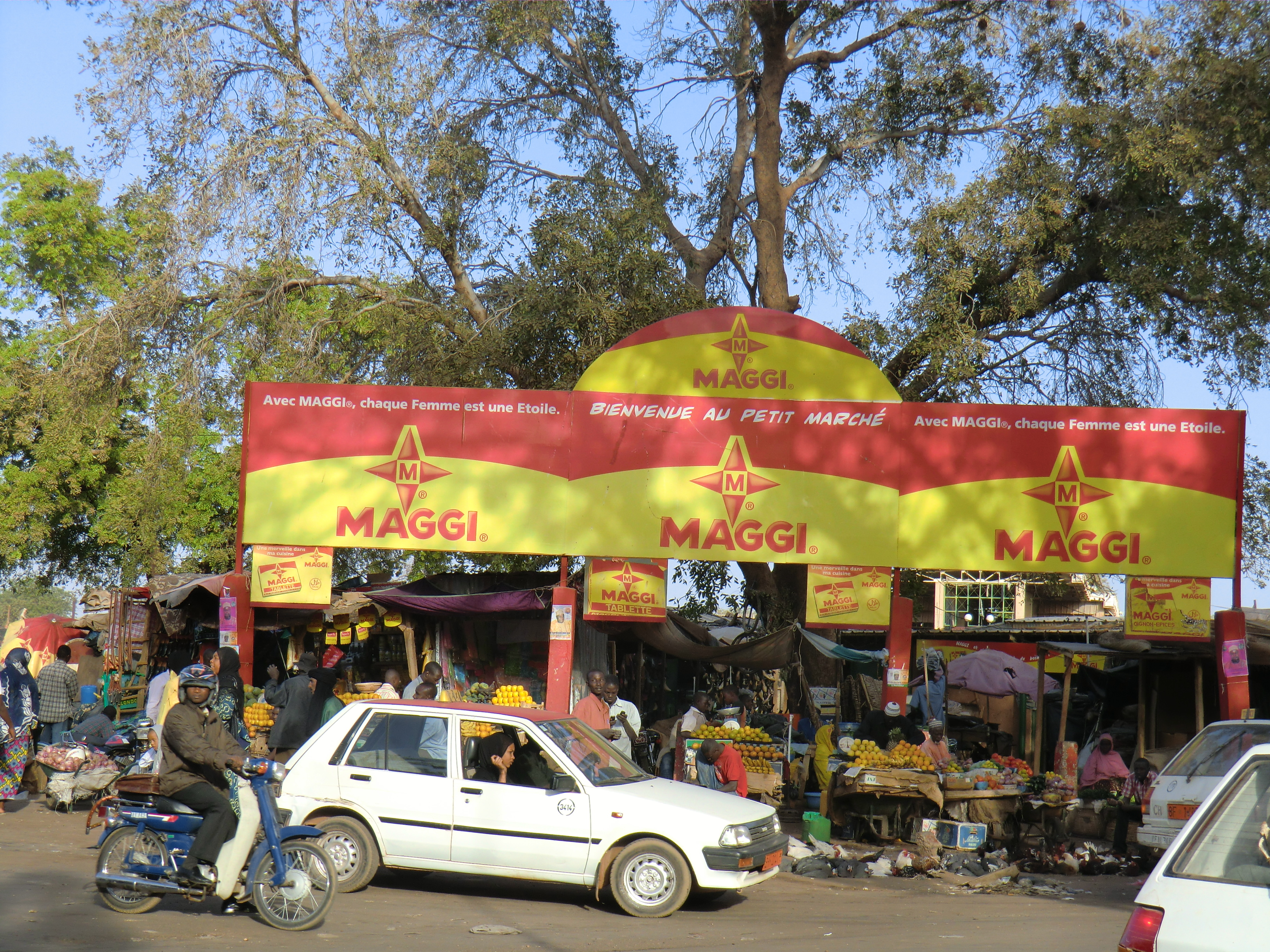 Entrée du Petit Marché, Niamey